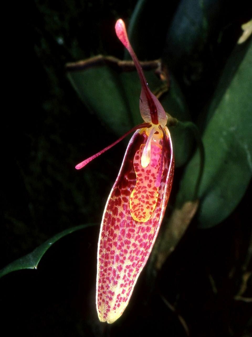 Restrepia roseola - flower